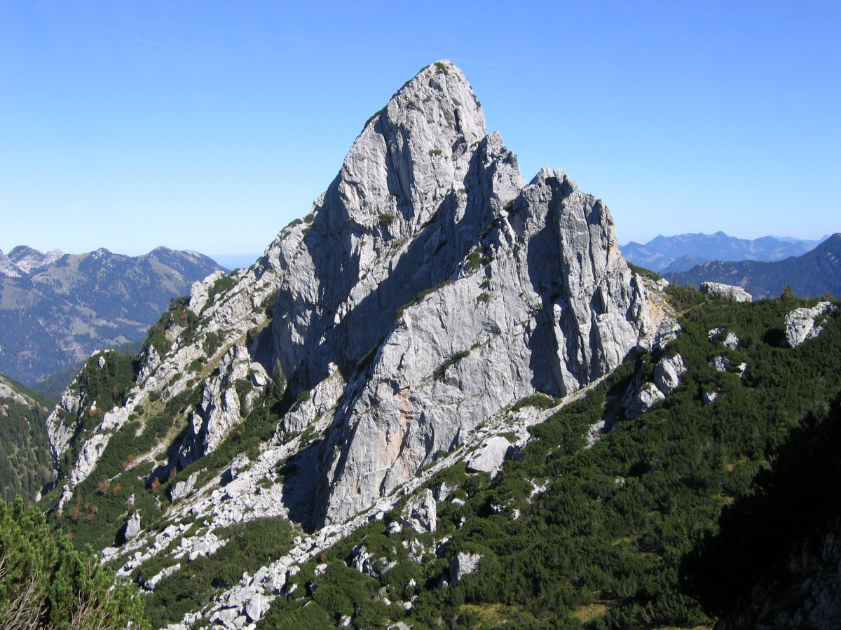 Ruchenköpfe, Mangfallgebirge